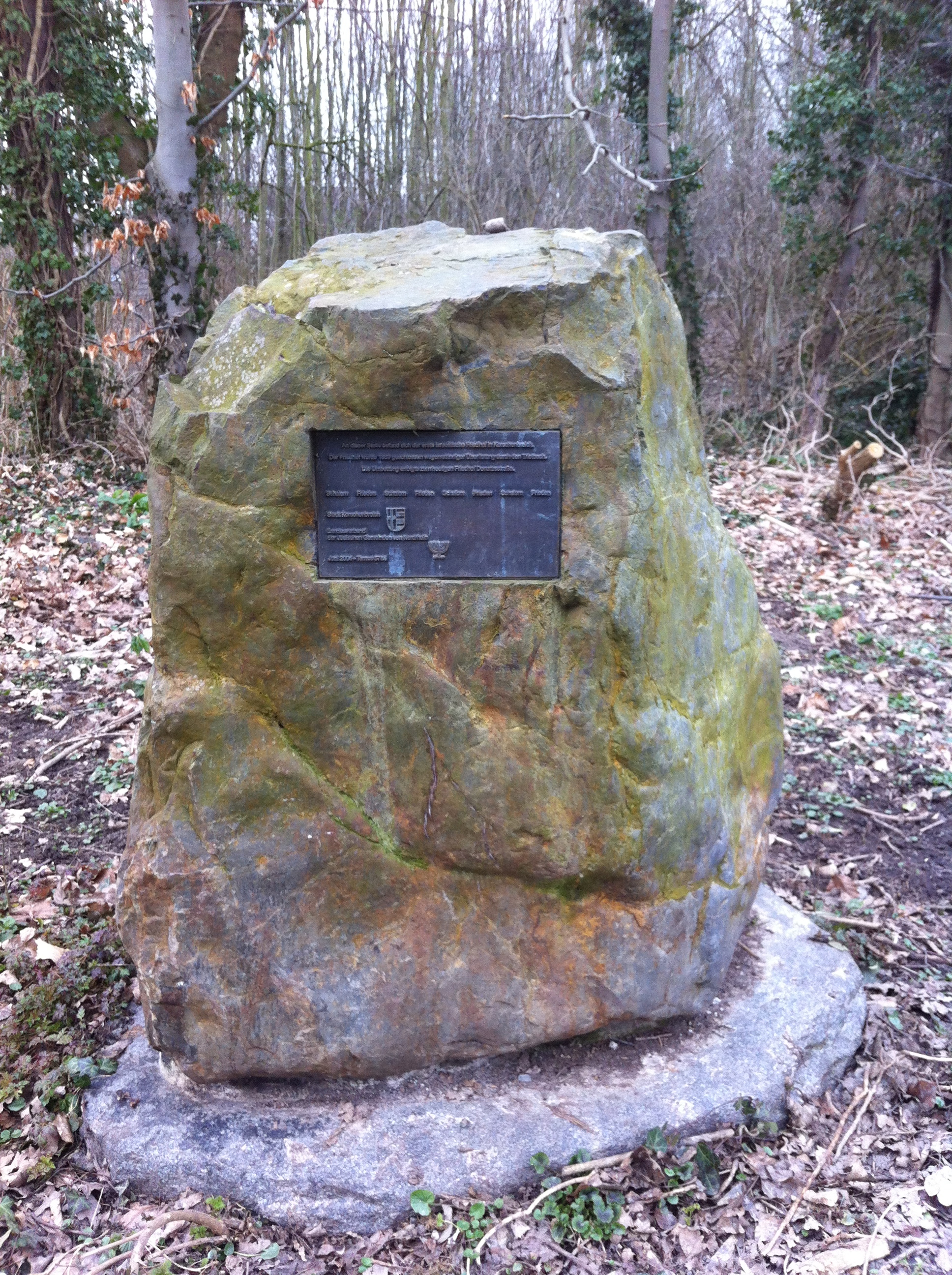 Der erste jüdische Friedhof in Pesch (Korschenbroich) wurde 1889 aufgegeben. Der Gedenkstein aus dem Jahr 2004 erinnert daran.